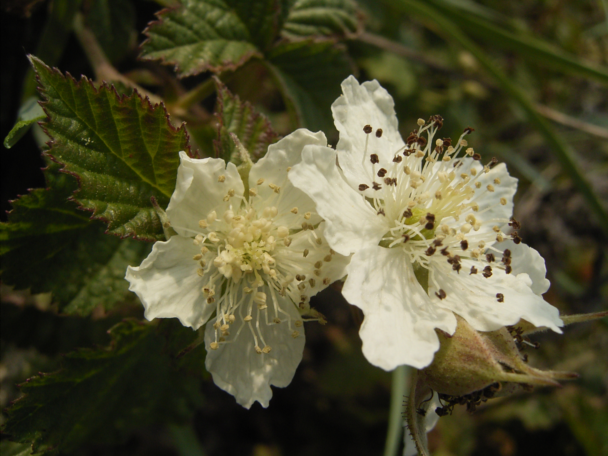 Deze foto toont de bloemen van de dauwbraam. Ik nam de foto op zaterdag 3 september 2005 in de duinen van Berkenheide bij Wassenaar. This photo shows the flowers of Rubus caesius. I took this photo on 3 september 2005 in the dunes near Wassenaar, Netherlands.